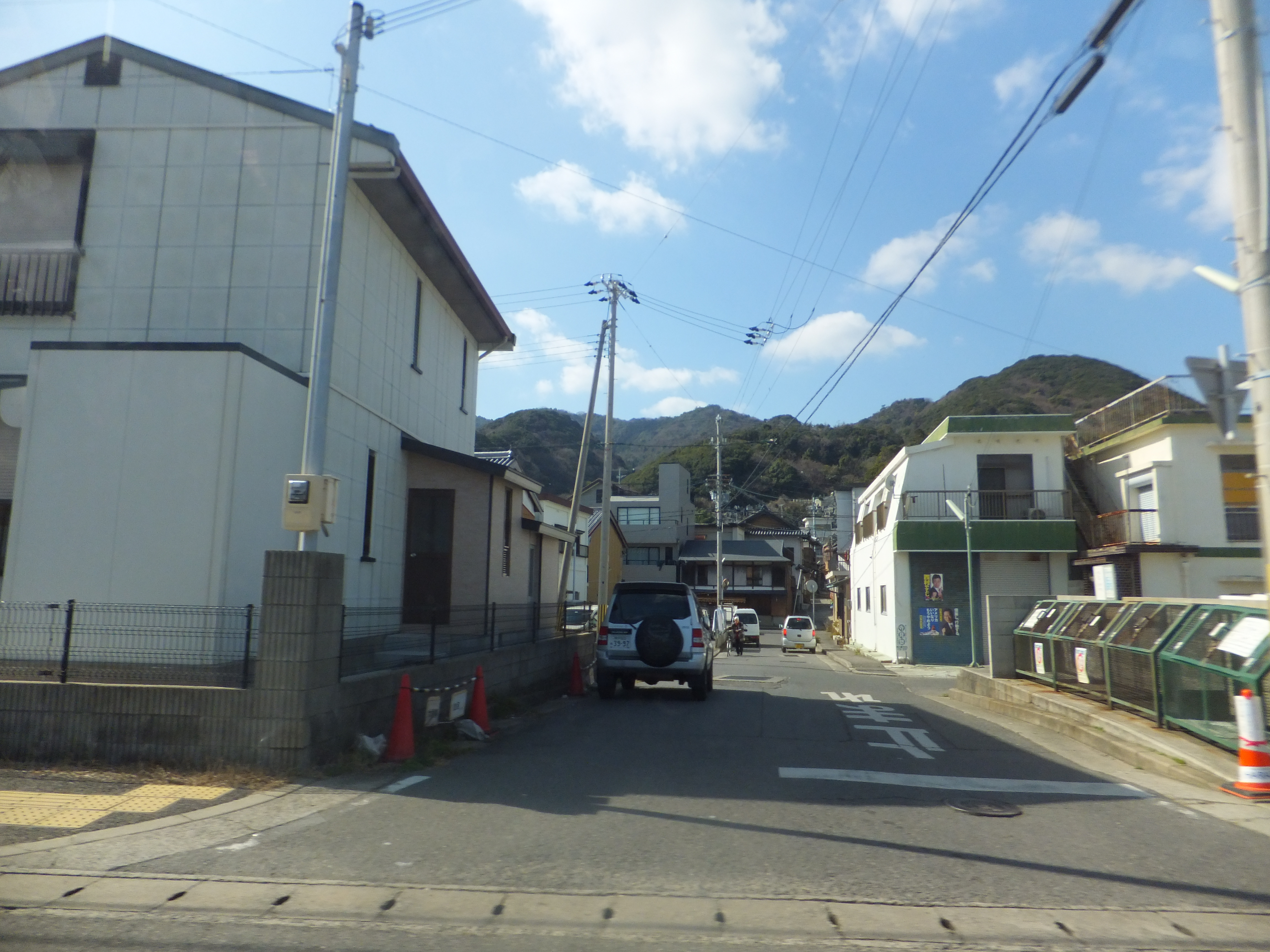 兵庫県洲本市由良町由良1丁目